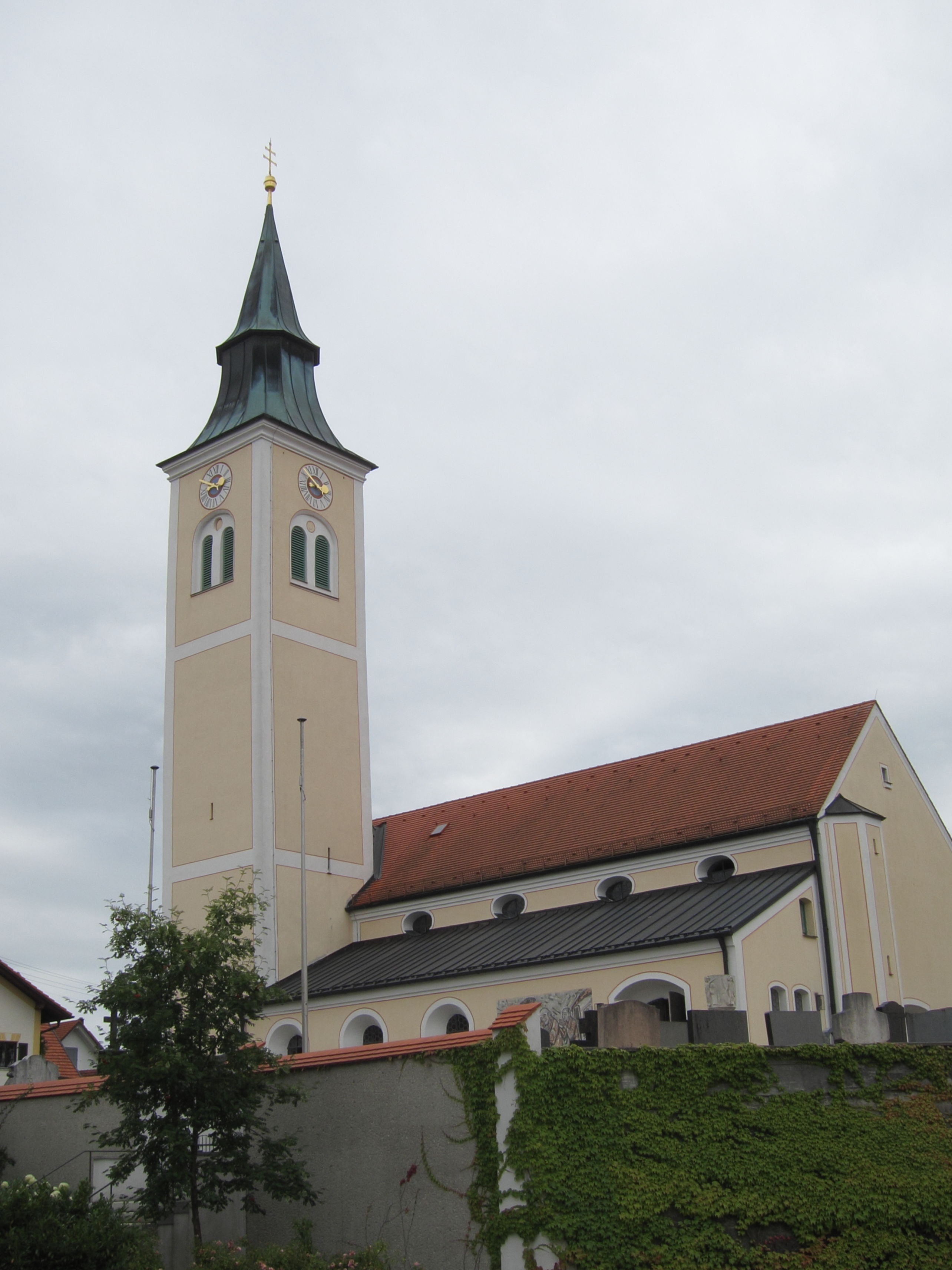 Katholische Pfarrkirche St. Martin, dreischiffiger Kirchenbau mit angefügter Annakapelle des 14./15. Jahrhundert, Langhaus im Kern spätromanisch um 1200, Chor und Turmunterbau spätgotisch 15. Jahrhundert, 1756/6 barockisiert und verändert, 1966/7 erweitert; mit Ausstattung.